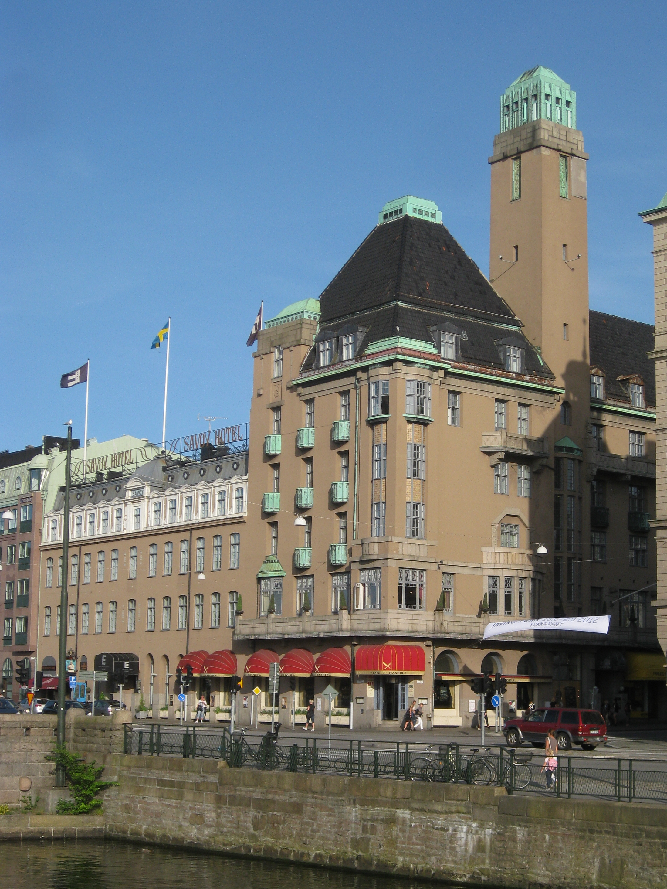 Hotel Savoy i Malmö